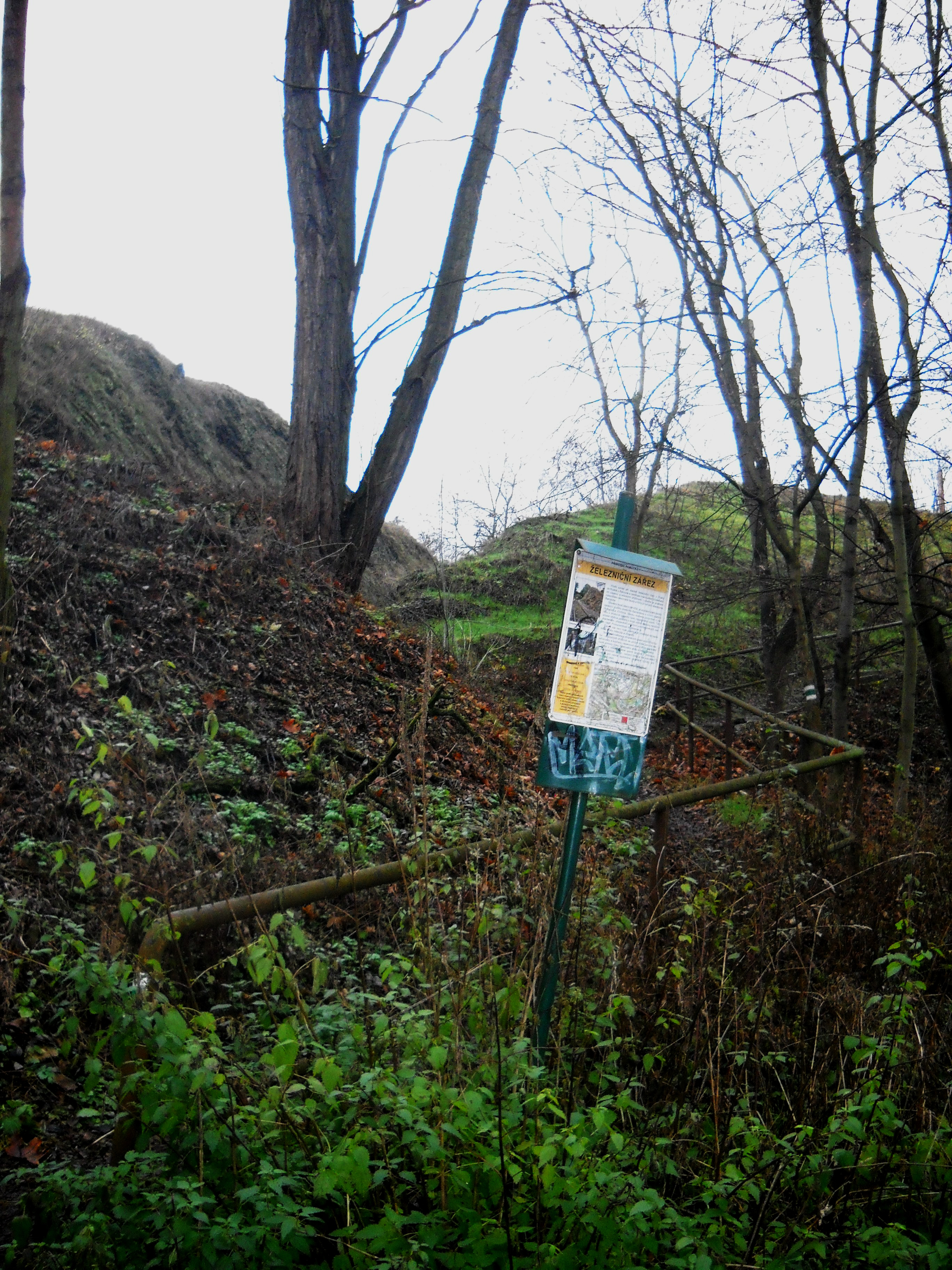 Praha-Hlubočepy. Pohled na přístupovou cestu k přírodní památce Železniční zářez s informační tabulí.